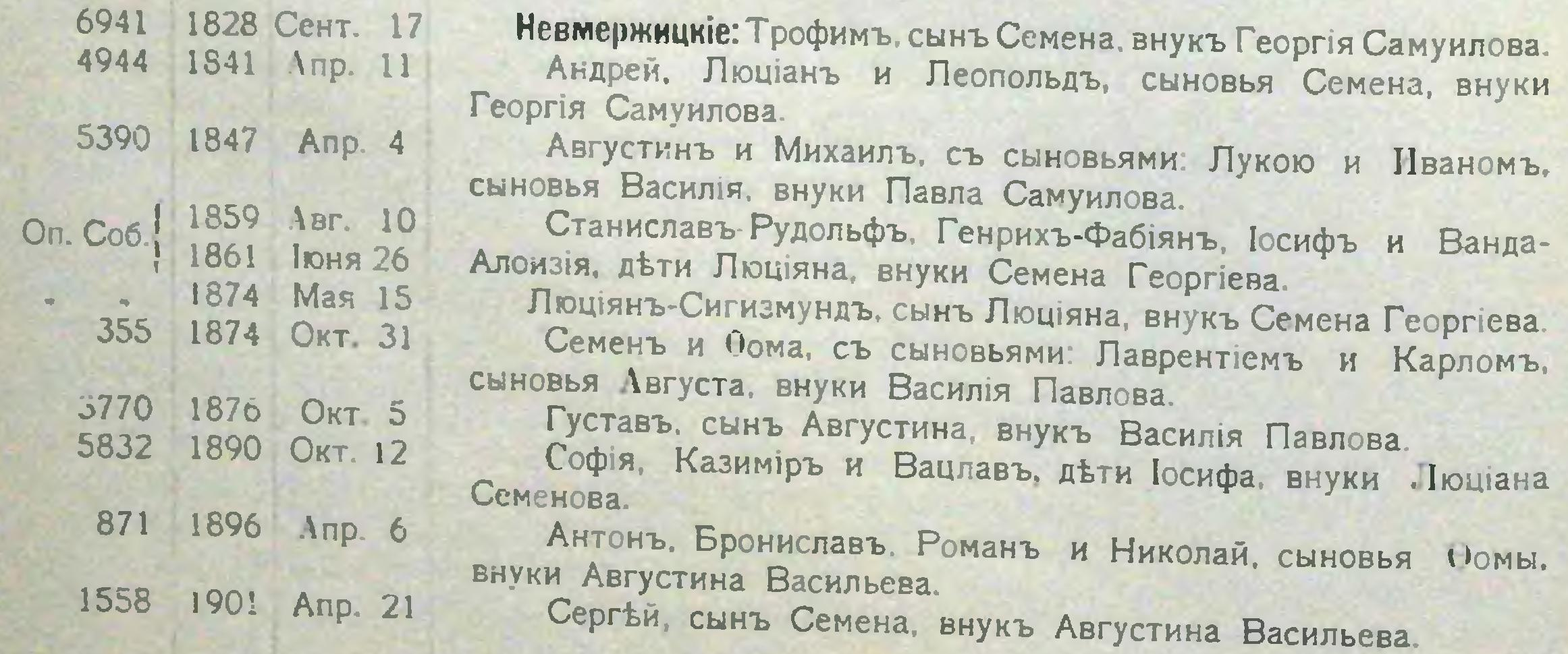 Niemierzycki, из Списка дворян Волынской губернии